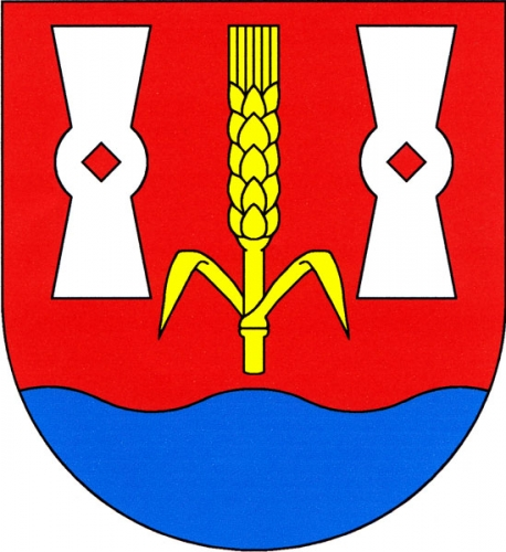 znak, Sudoměřice u Tábora, okres Tábor